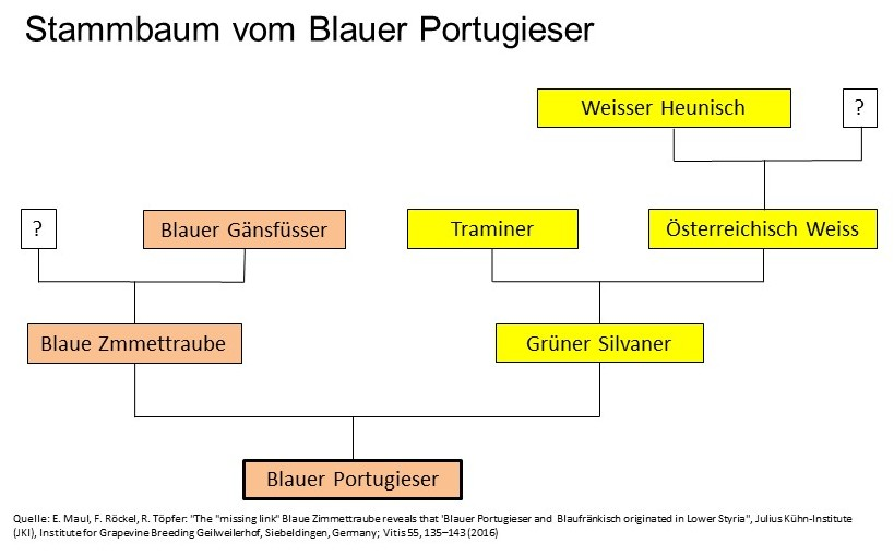 Stammbaum vom Blauen Portugieser